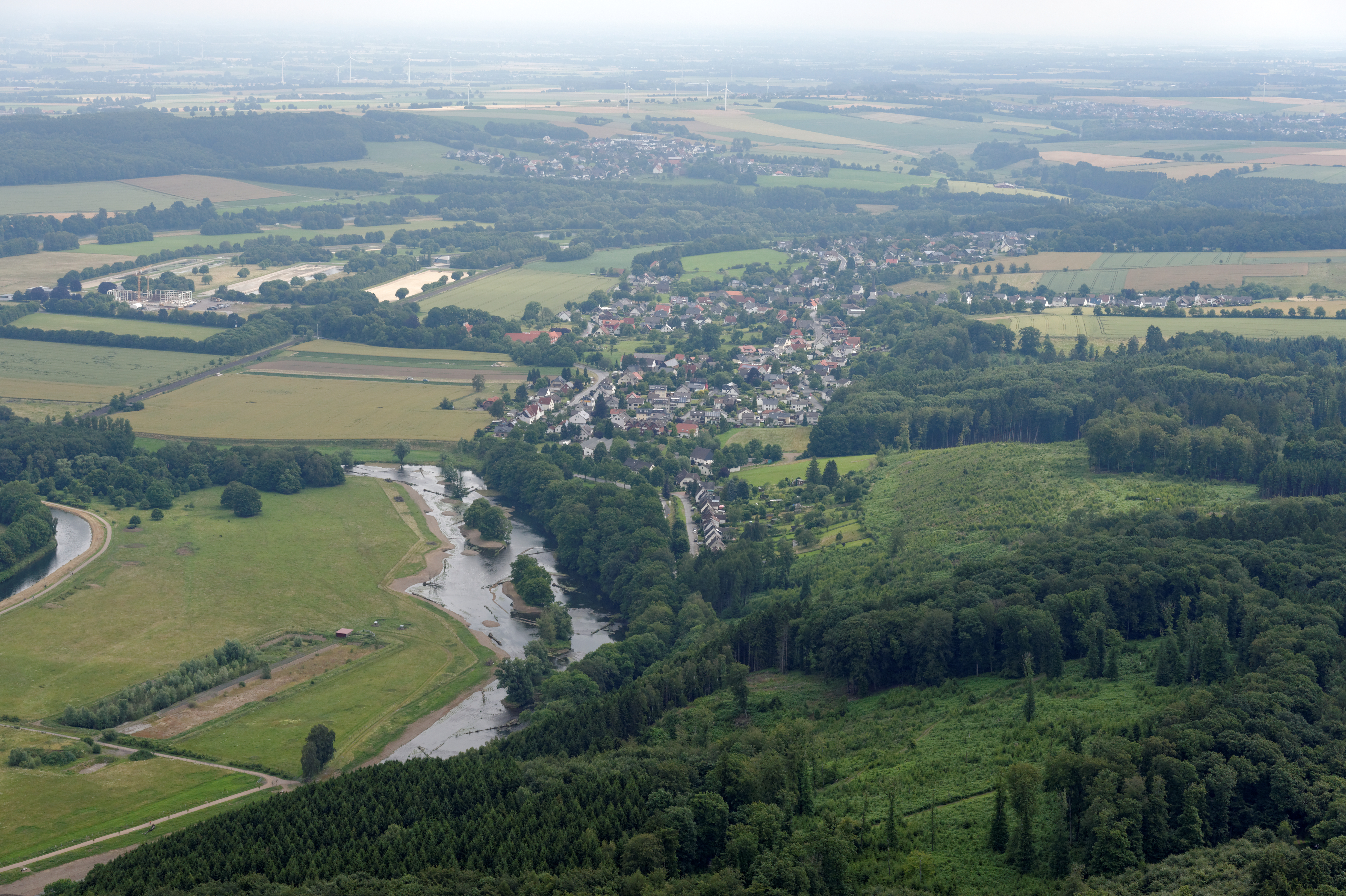 Wickede (Ruhr)-Echthausen im Ruhrtal, links Obergraben, Bahnstrecke Schwerte–Warburg, Wasserwerk, Blickrichtung Ost. Fotoflug Sauerland Nord. The making of this document was supported by the Community-Budget of Wikimedia Germany.